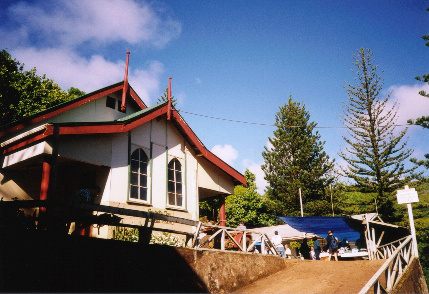 Hauptplatz mit Kirche, Adamstown, Pitcairninsel